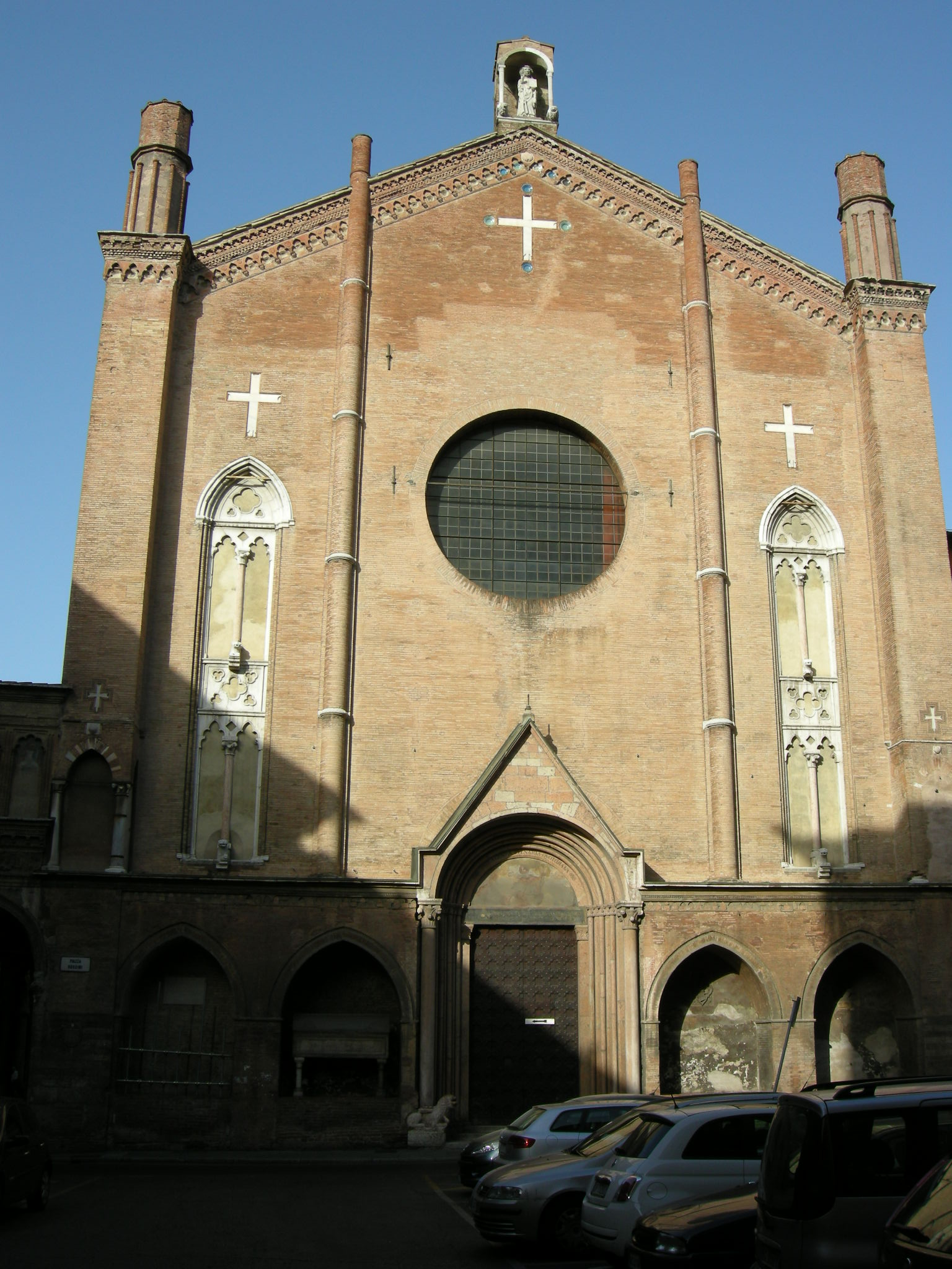 Bologna, san giacomo maggiore, facciata